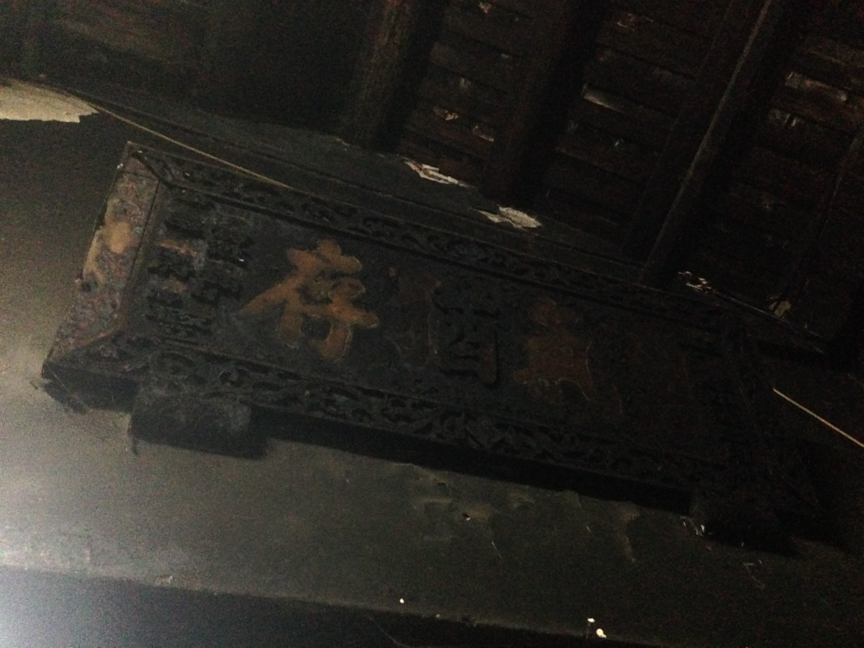 迪毅堂匾額